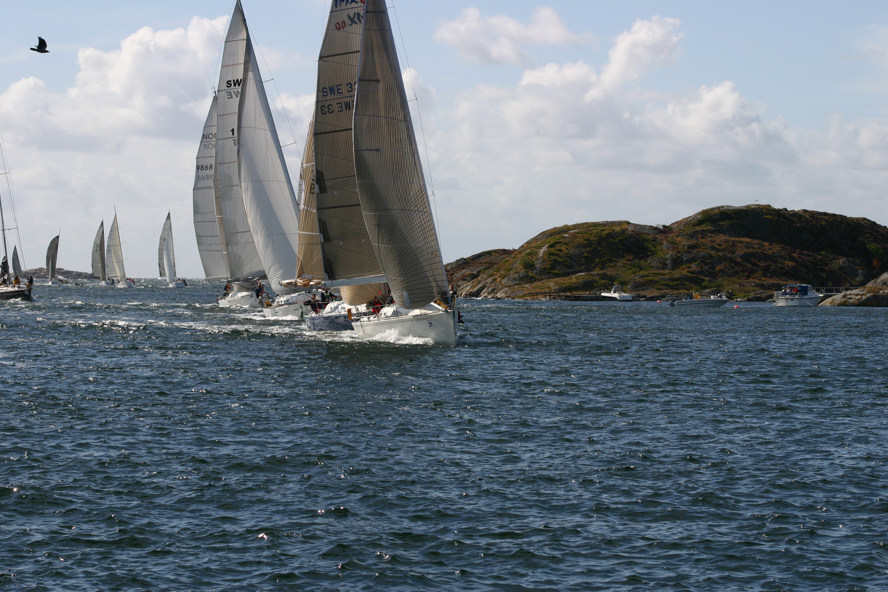 Tjörn Runt 2004 p. Schmidtke